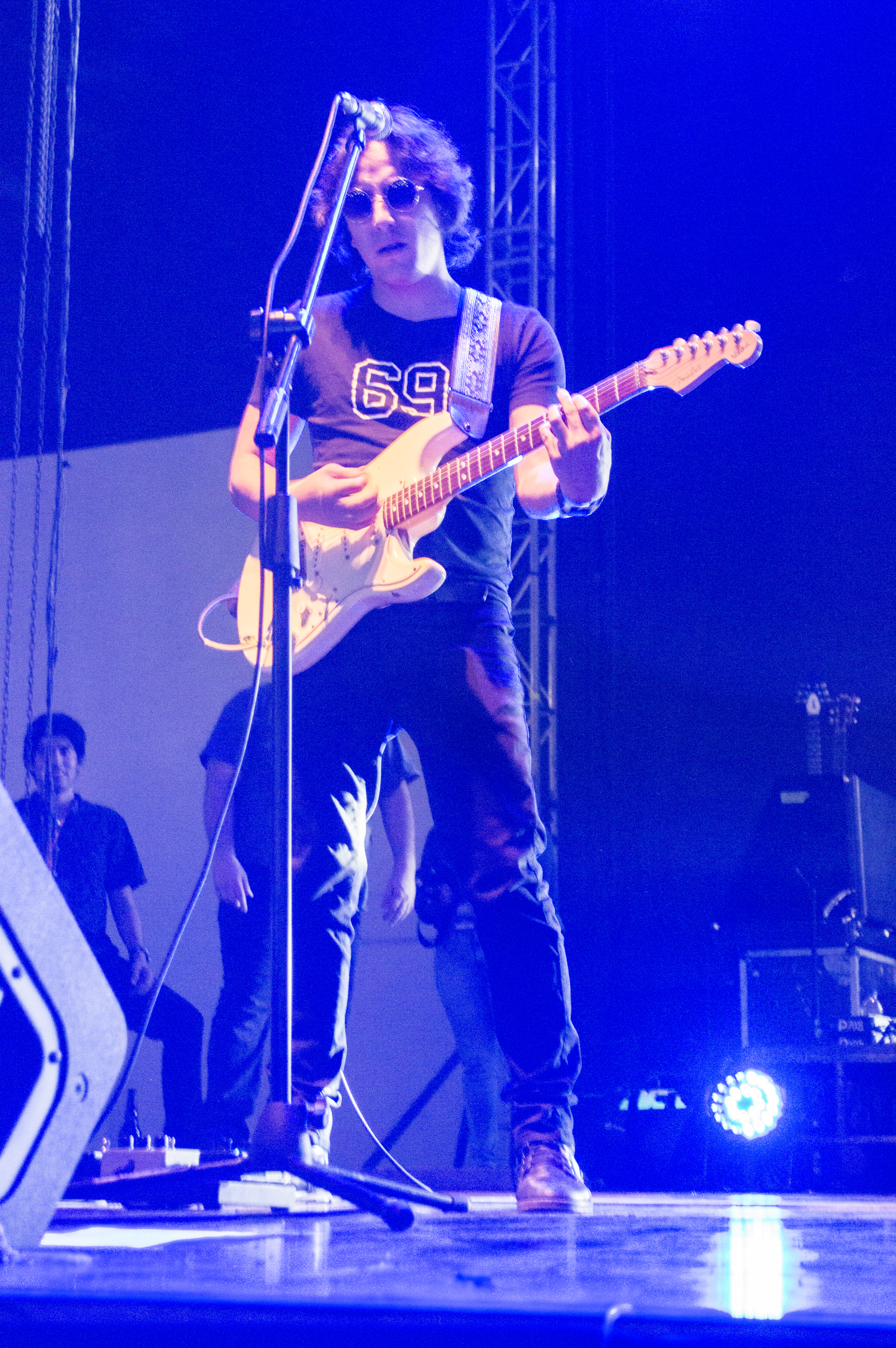 César Galarza, y guitarrista de Verde 70, en un concierto en la ESPOL, en 2016.